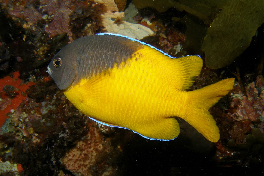 Parma bicolor en Albany, oeste de Australia